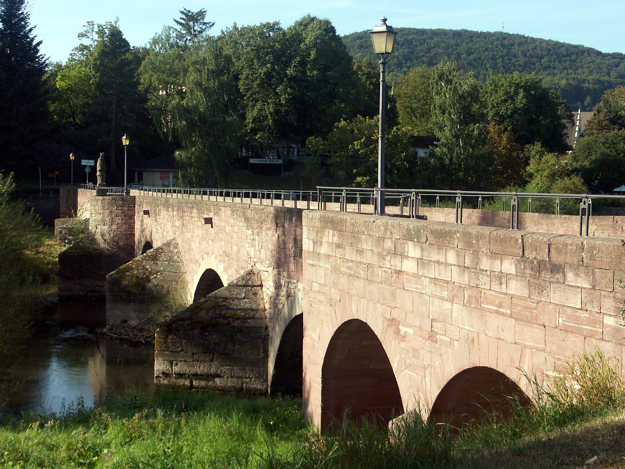 Die alte Brücke über die Fränkische Saale in Euerdorf